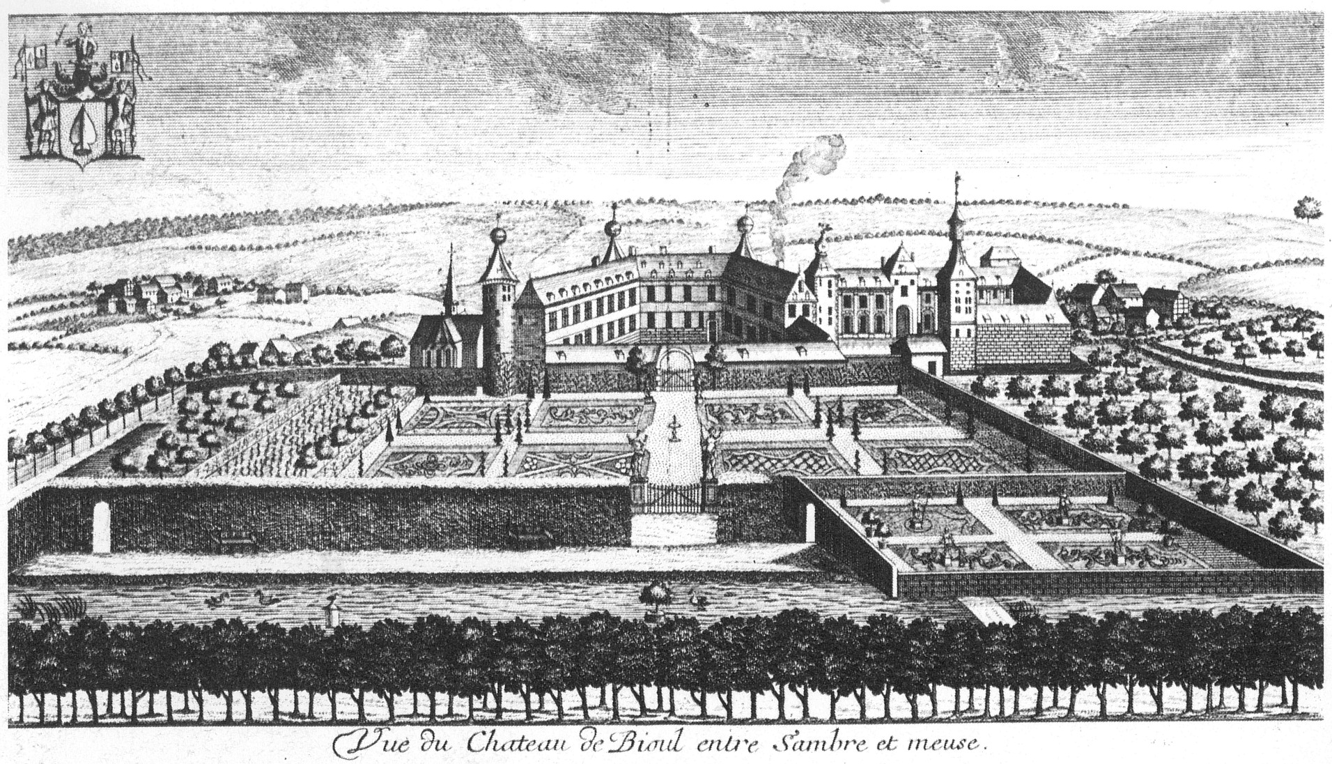 Stich mit der Abbildung des Schlosses Bioul, Ansicht von Osten